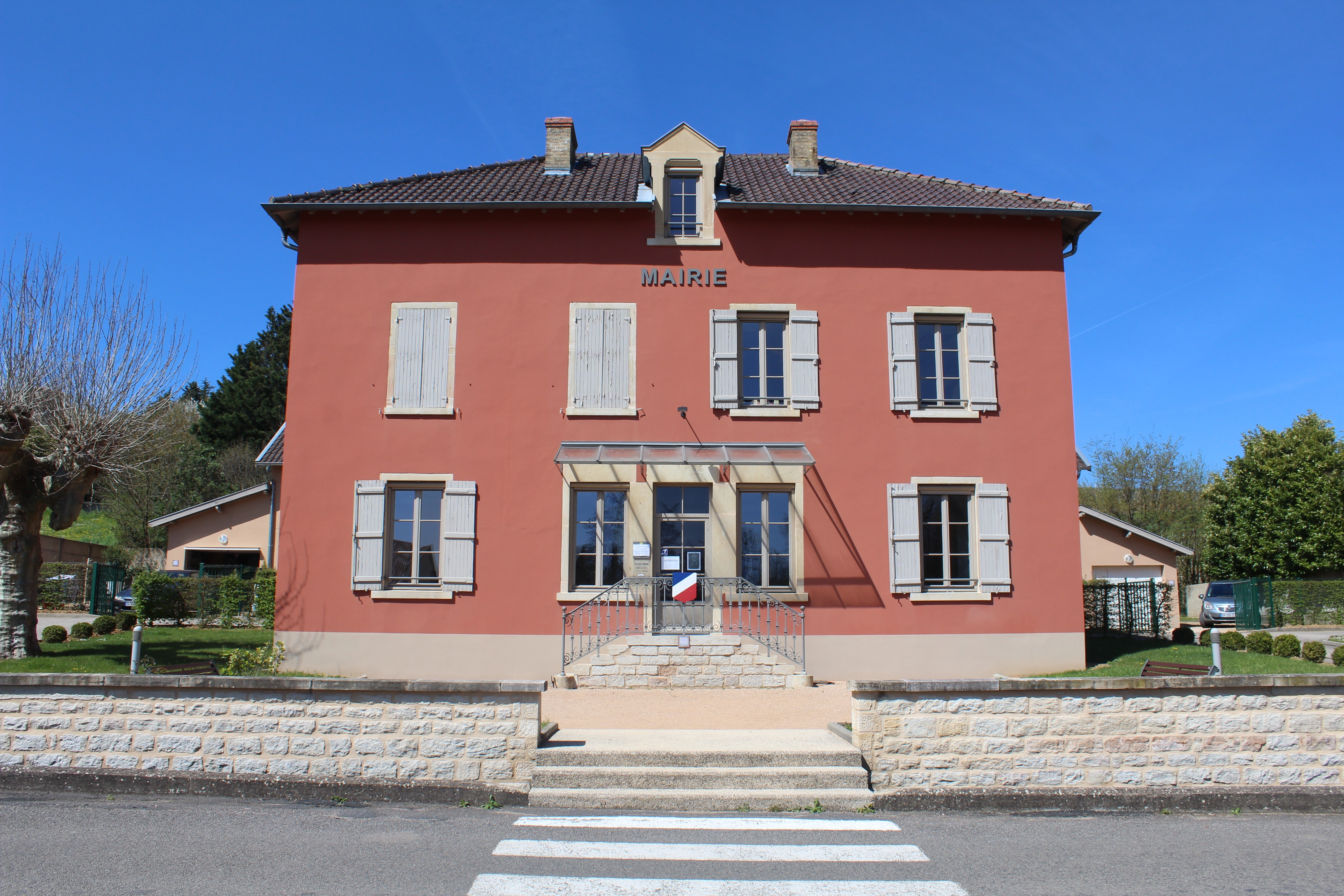 Mairie de Davayé dans la Saône-et-Loire